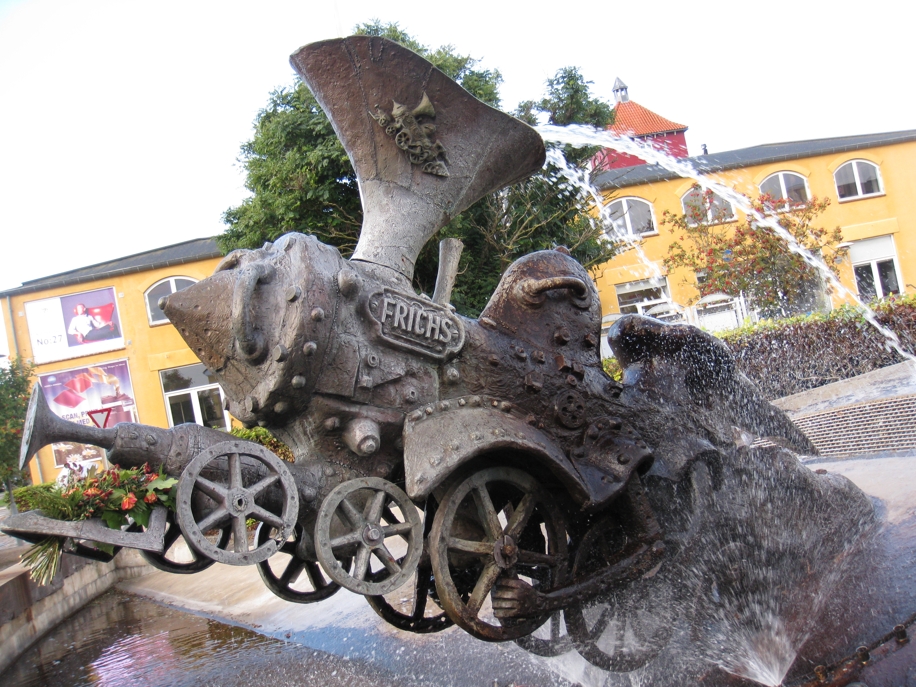 Скульптура Петра Рейхета «Озверевший паровоз»